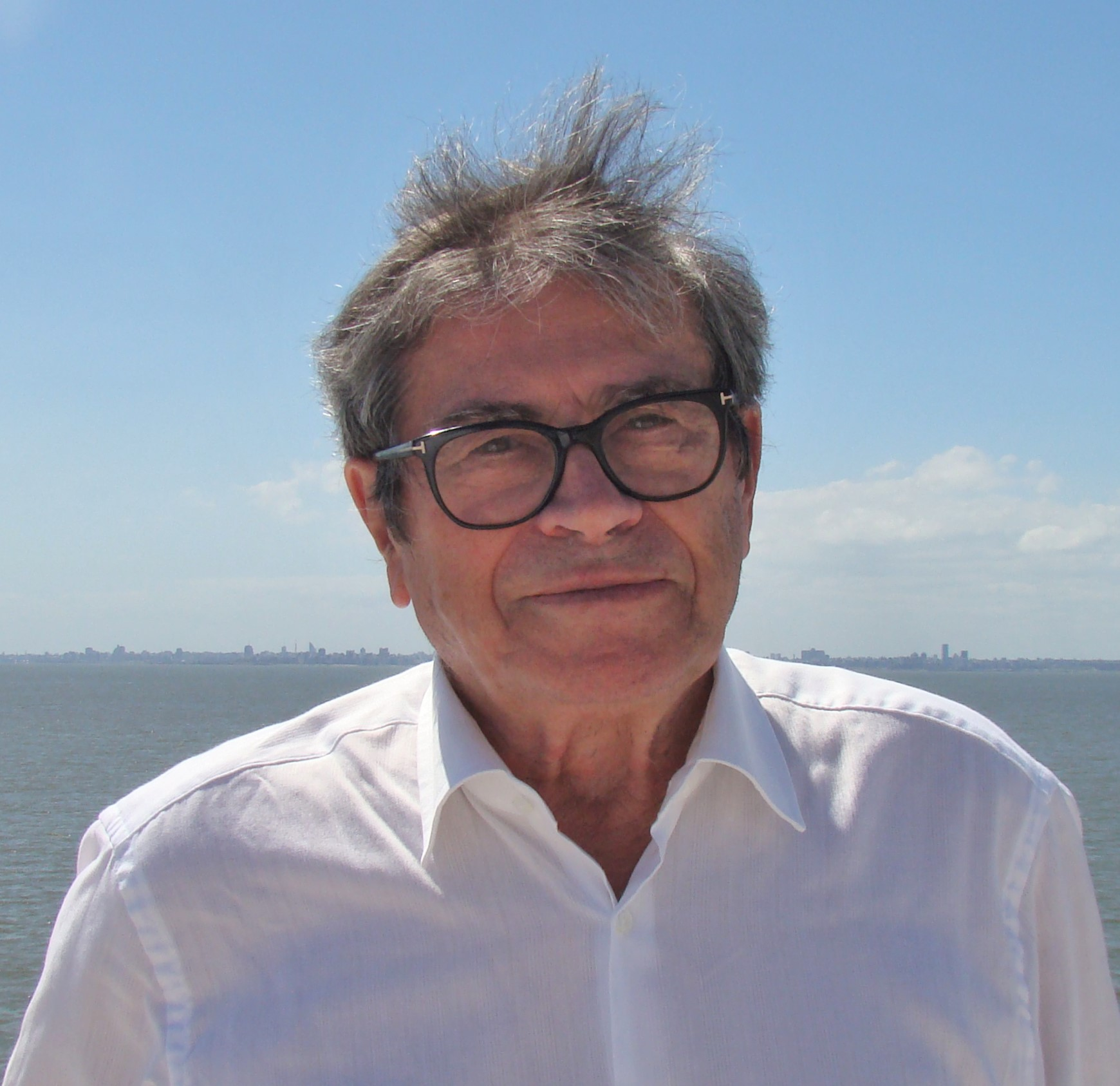 Contre-amiral Francois Bellec Rio de la Plata 2016